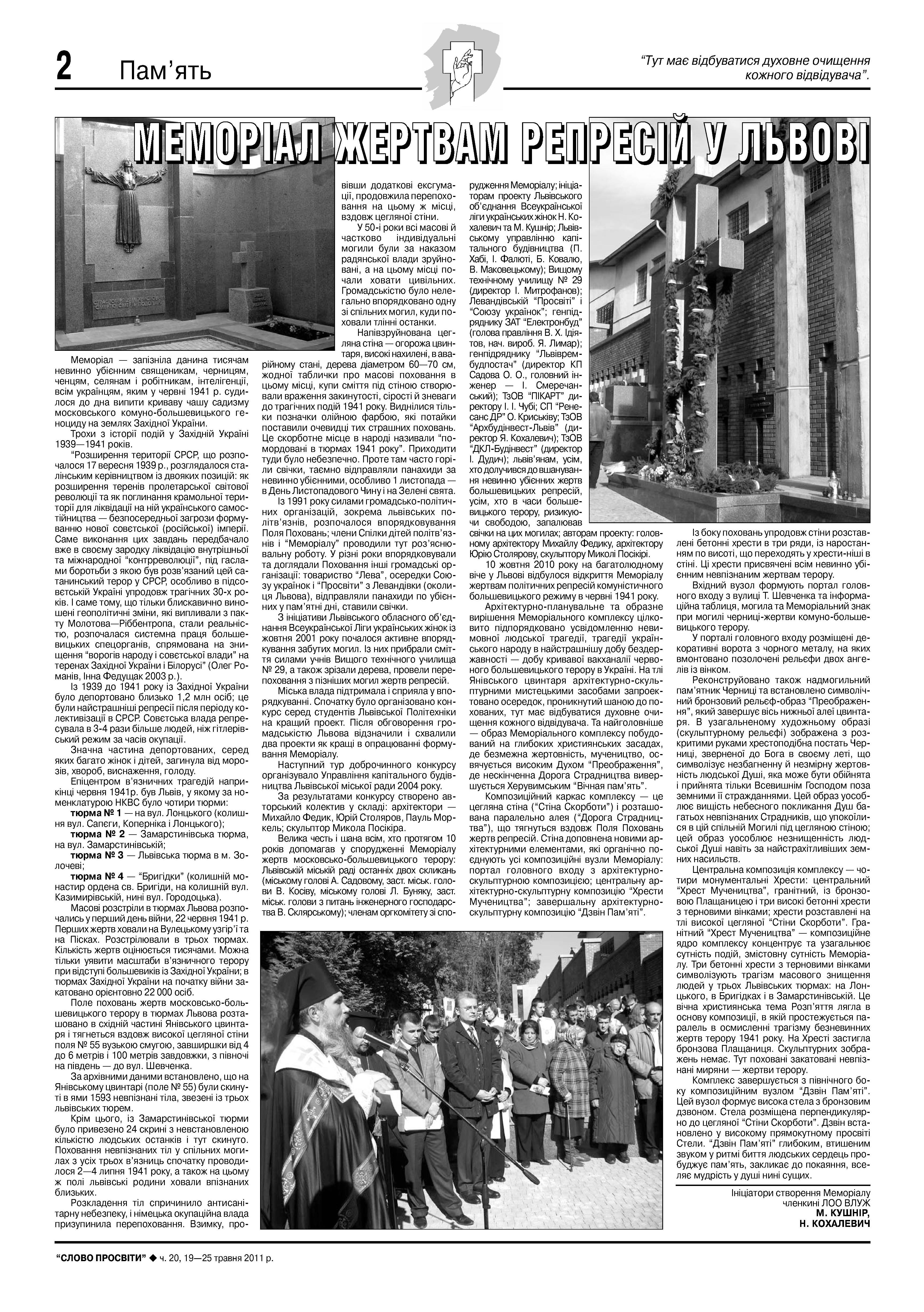 ч. 20 (605), 19-25 травня 2011 р.